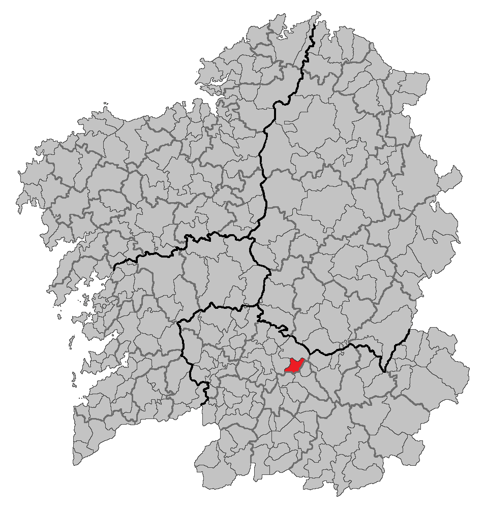 Mapa coa localización do concello de Coles.